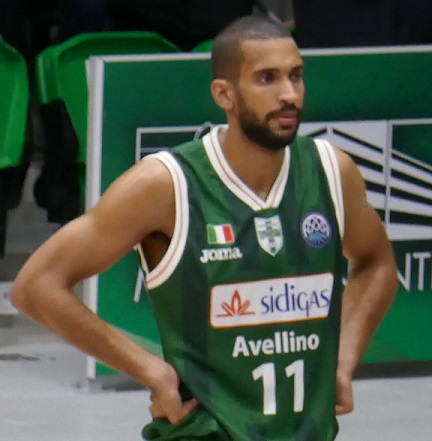 Thomas Scrubb